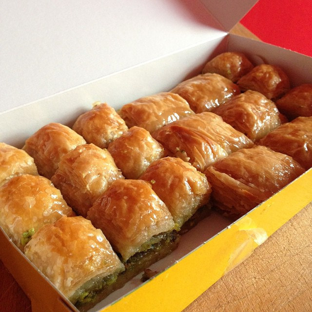 Baklava from Gaziantep, Turkey.